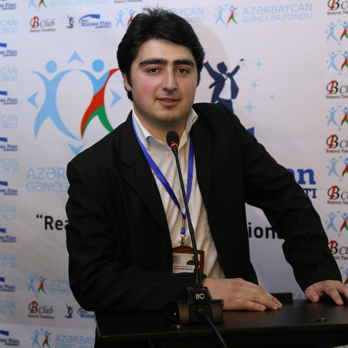 Biznes təlimindən foto